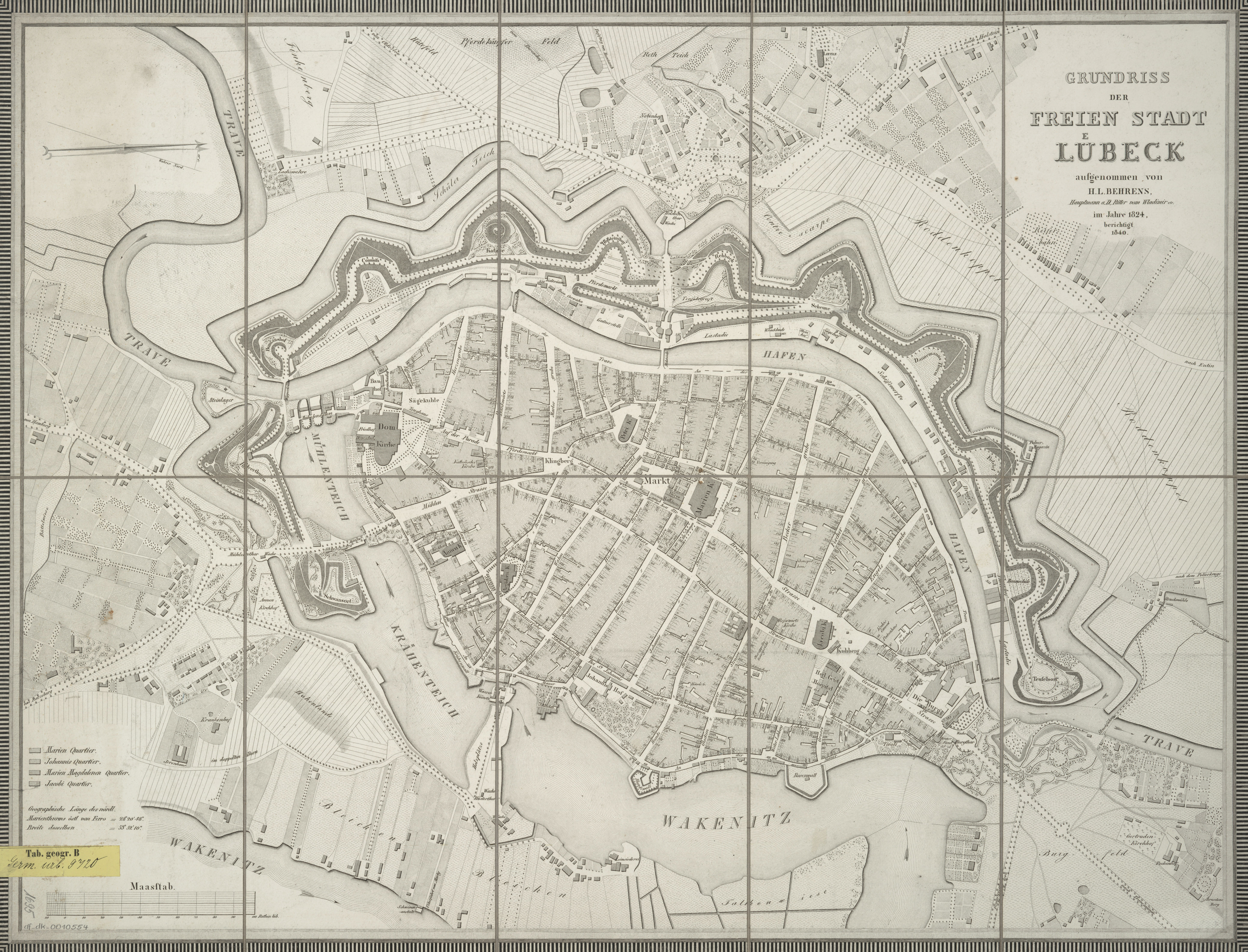 Stadtplan von Lübeck, 1840